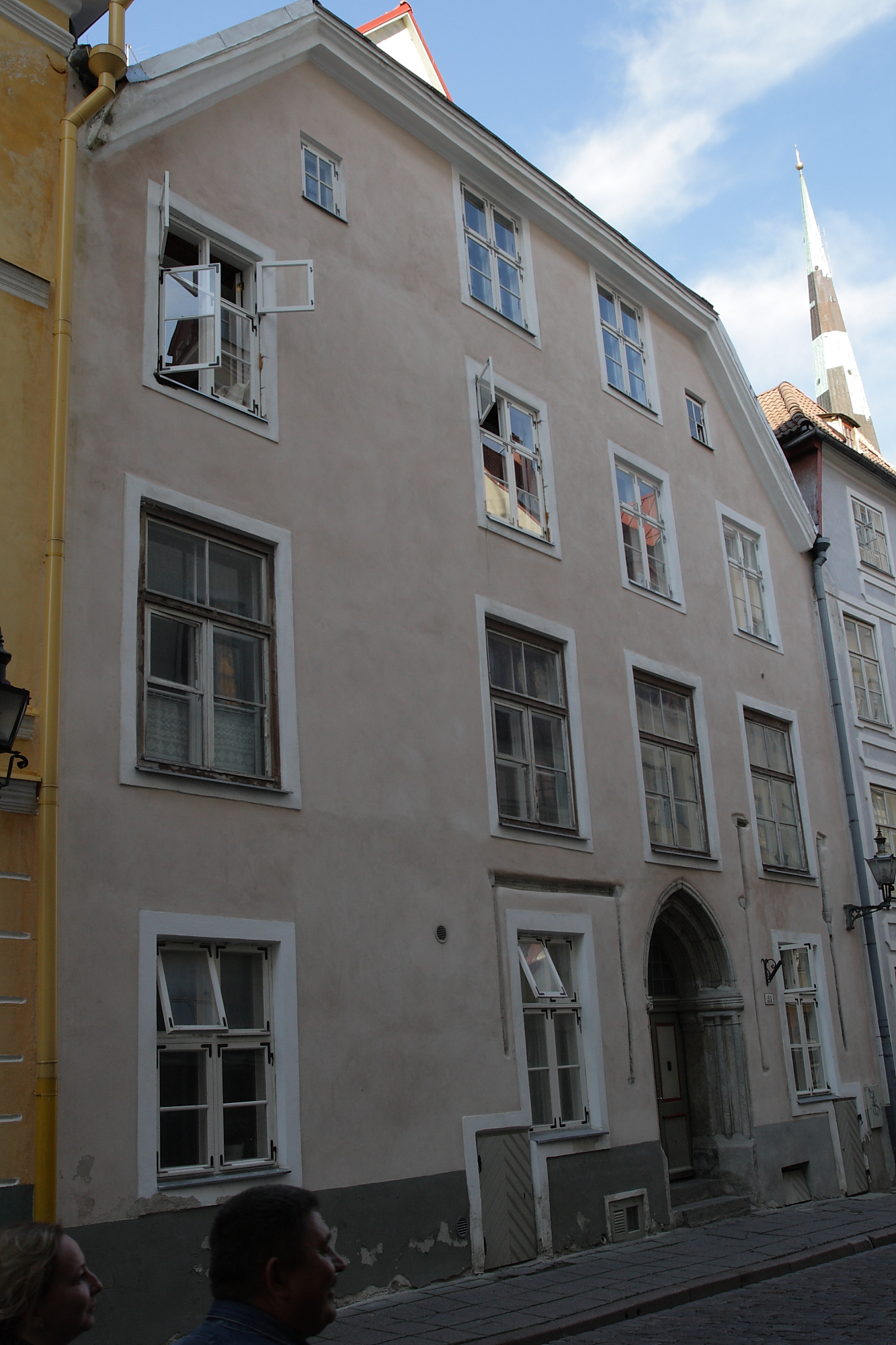 Tallinn, elamu Pikk 51, 15.-20.saj